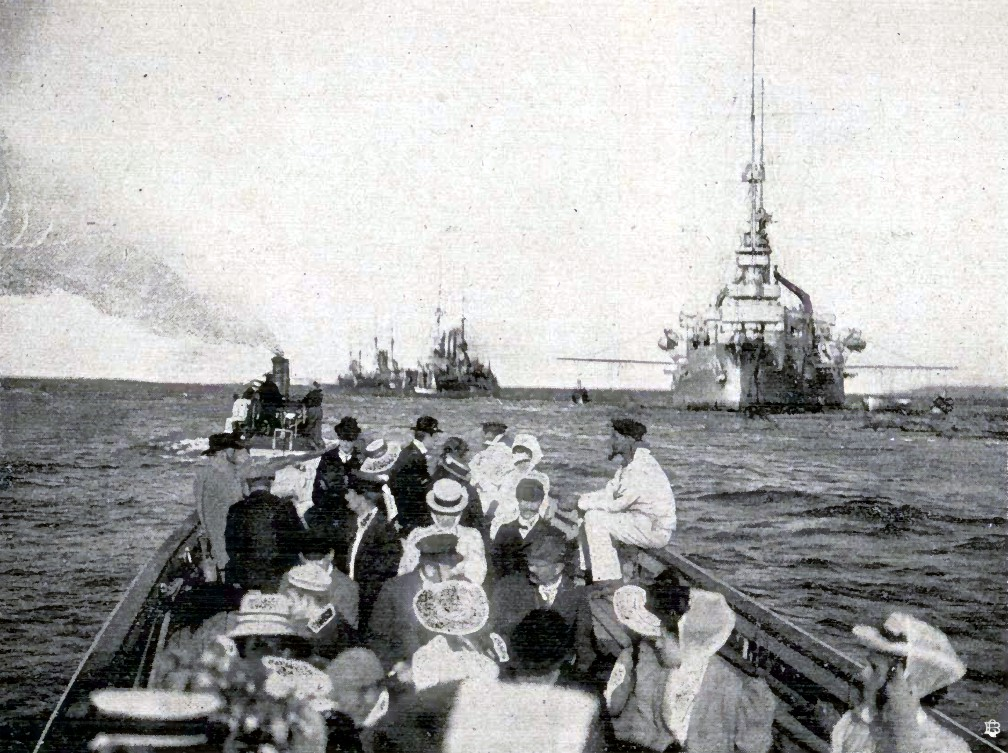 Auf der Fahrt zur Hochseeflotte.